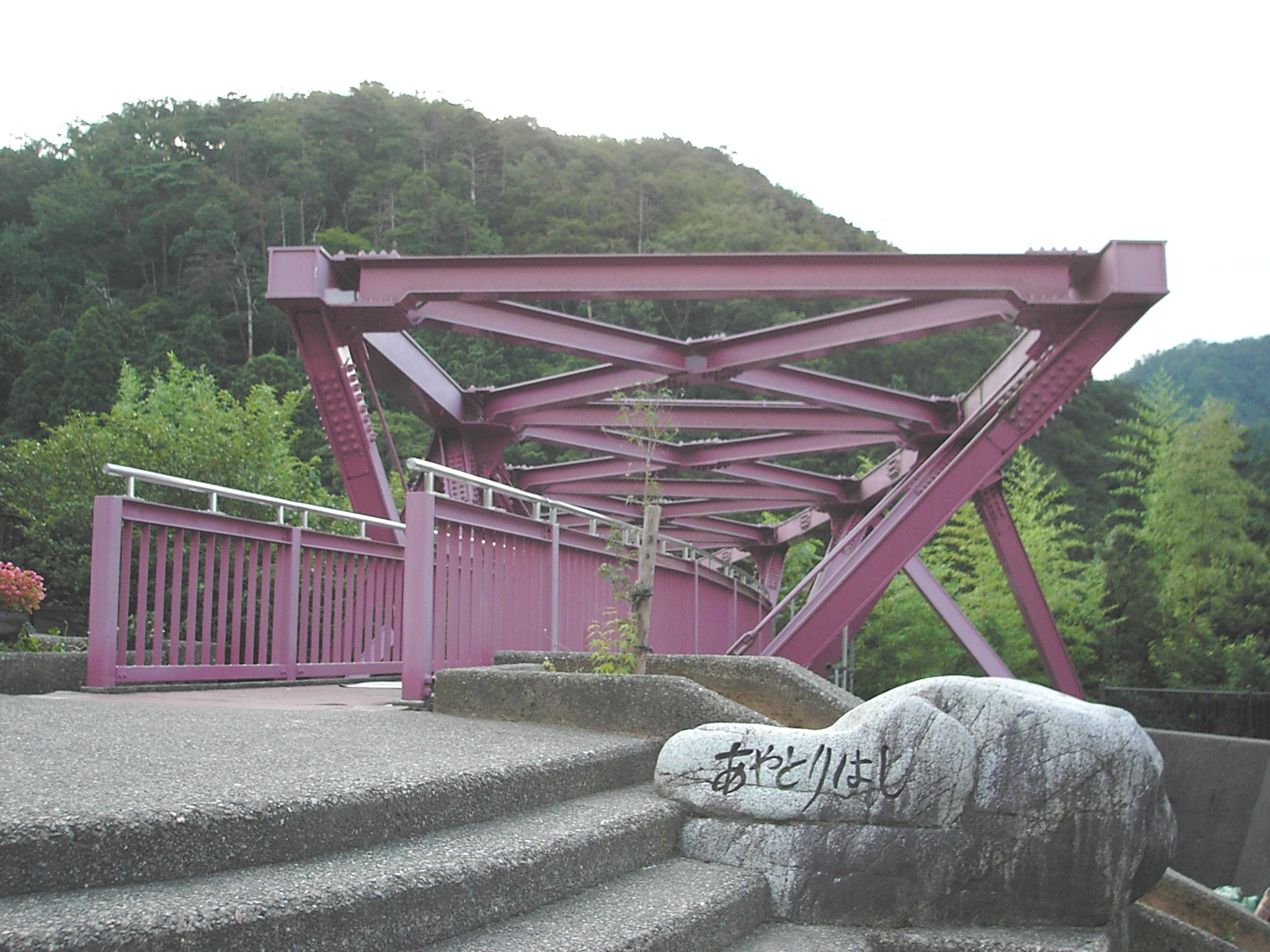 Ayatorihashi in Yamanaka spa